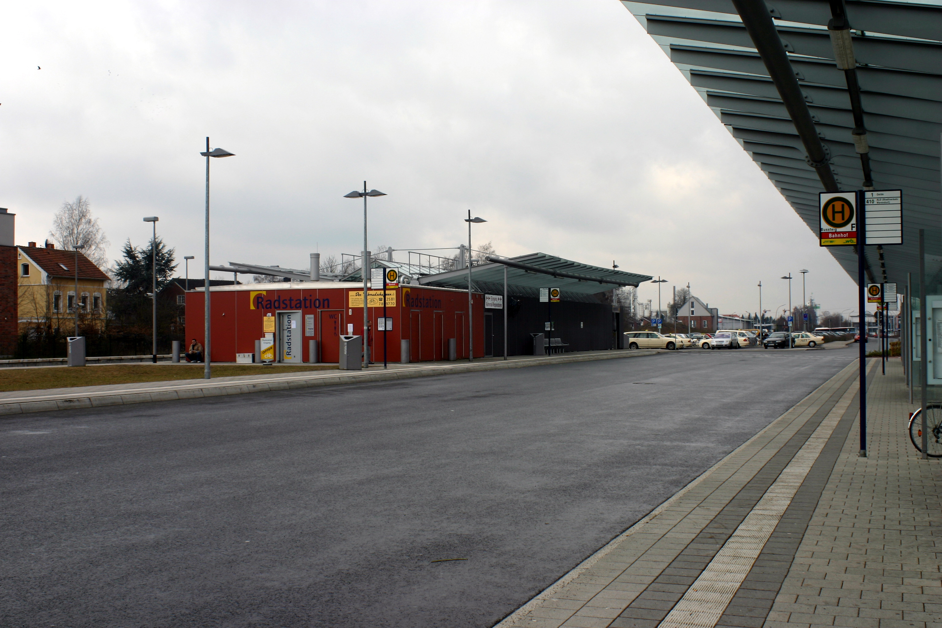 Radstation/Fahrradparkhaus am Bahnhof in Warendorf